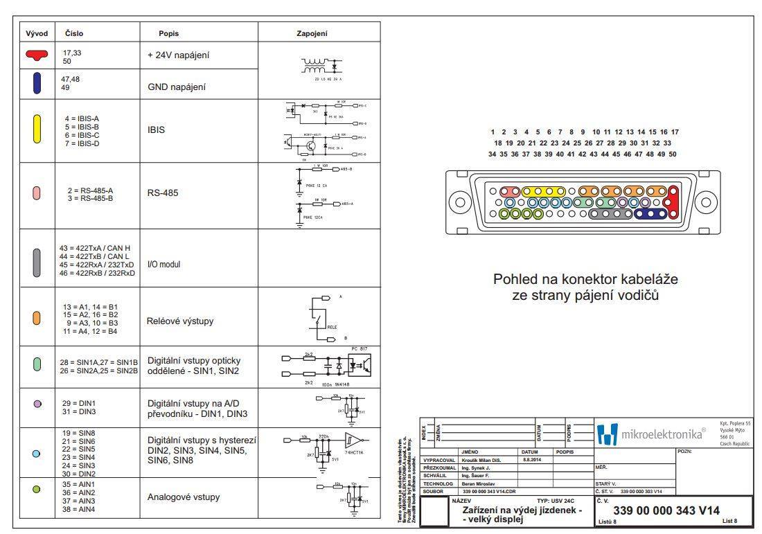 Zapojení strojku USV24C